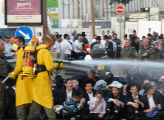 התזת בואש ישירות על המפגינים ישראל 2018